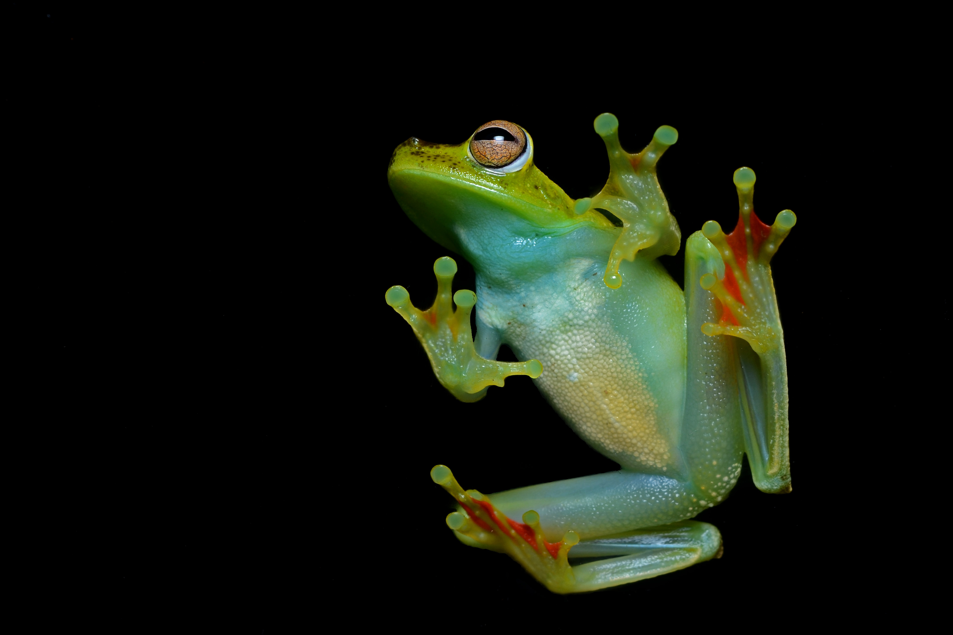 Hylidae: Hypsiboas rufitelus